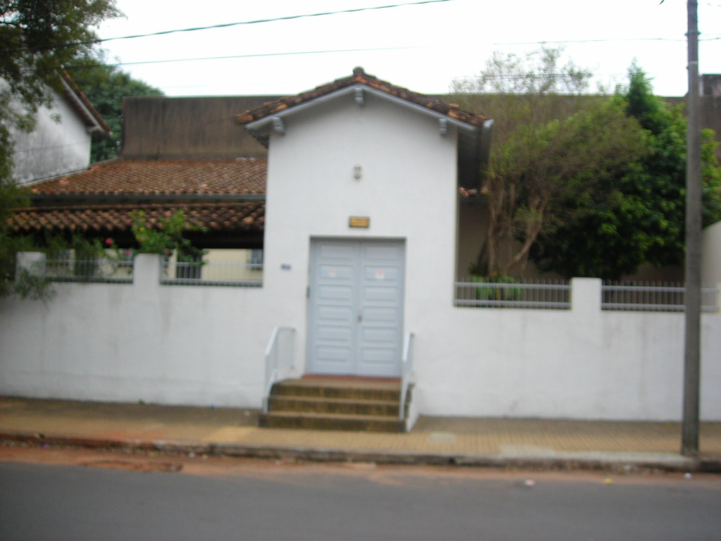 Combento